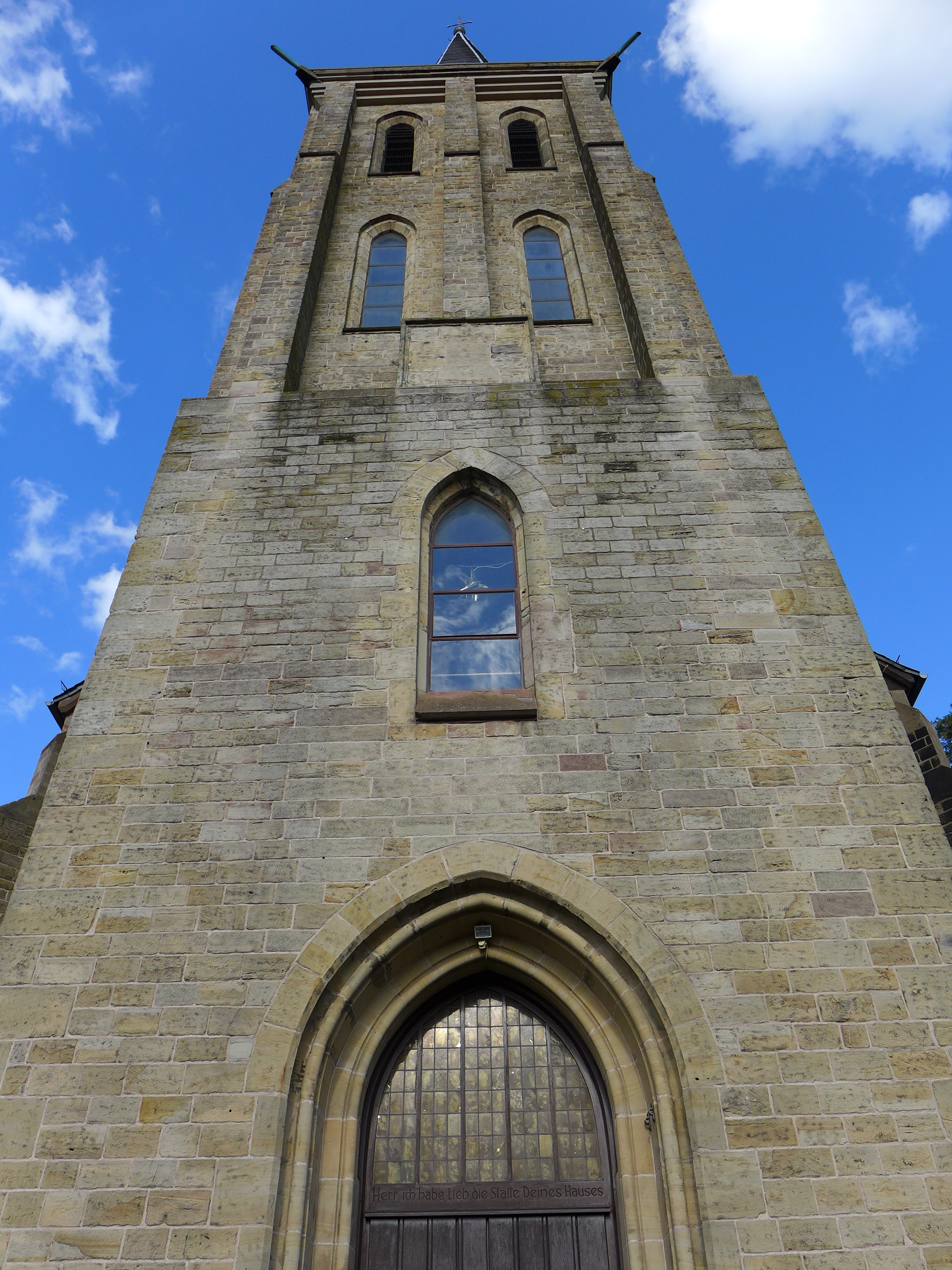 Malstatt, Evangelische Kirche auf der Malstatt, Turmfassade